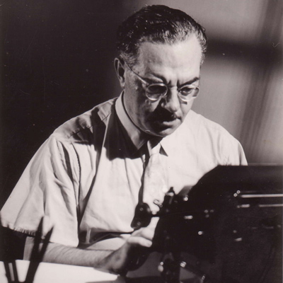 Israel Zeitlin, más conocido por el seudónimo de César Tiempo, fue un escritor y peridista argentino nacido en Ucrania en 1906.